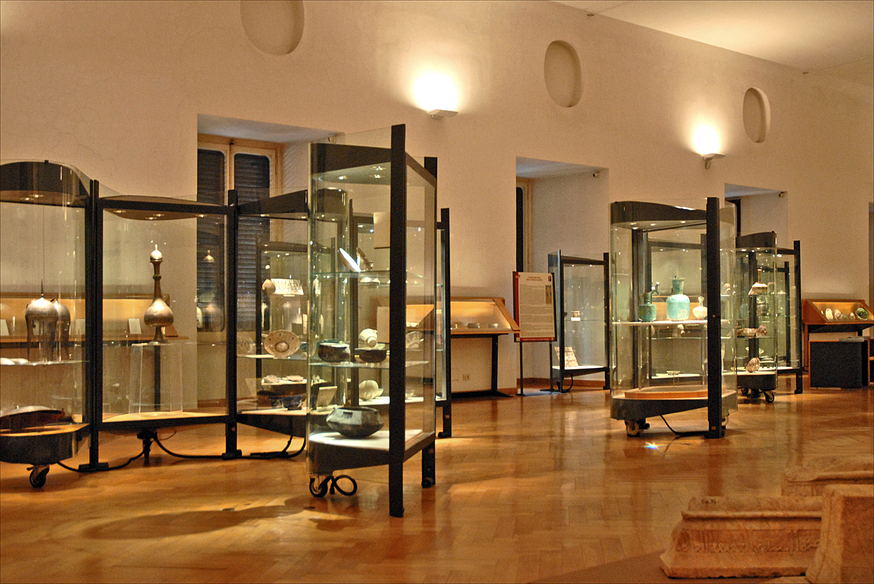 Salle sur l'art islamique Musée national d'art oriental (MNAR) / Museo nazionale d'arte orientale Site officiel du musée